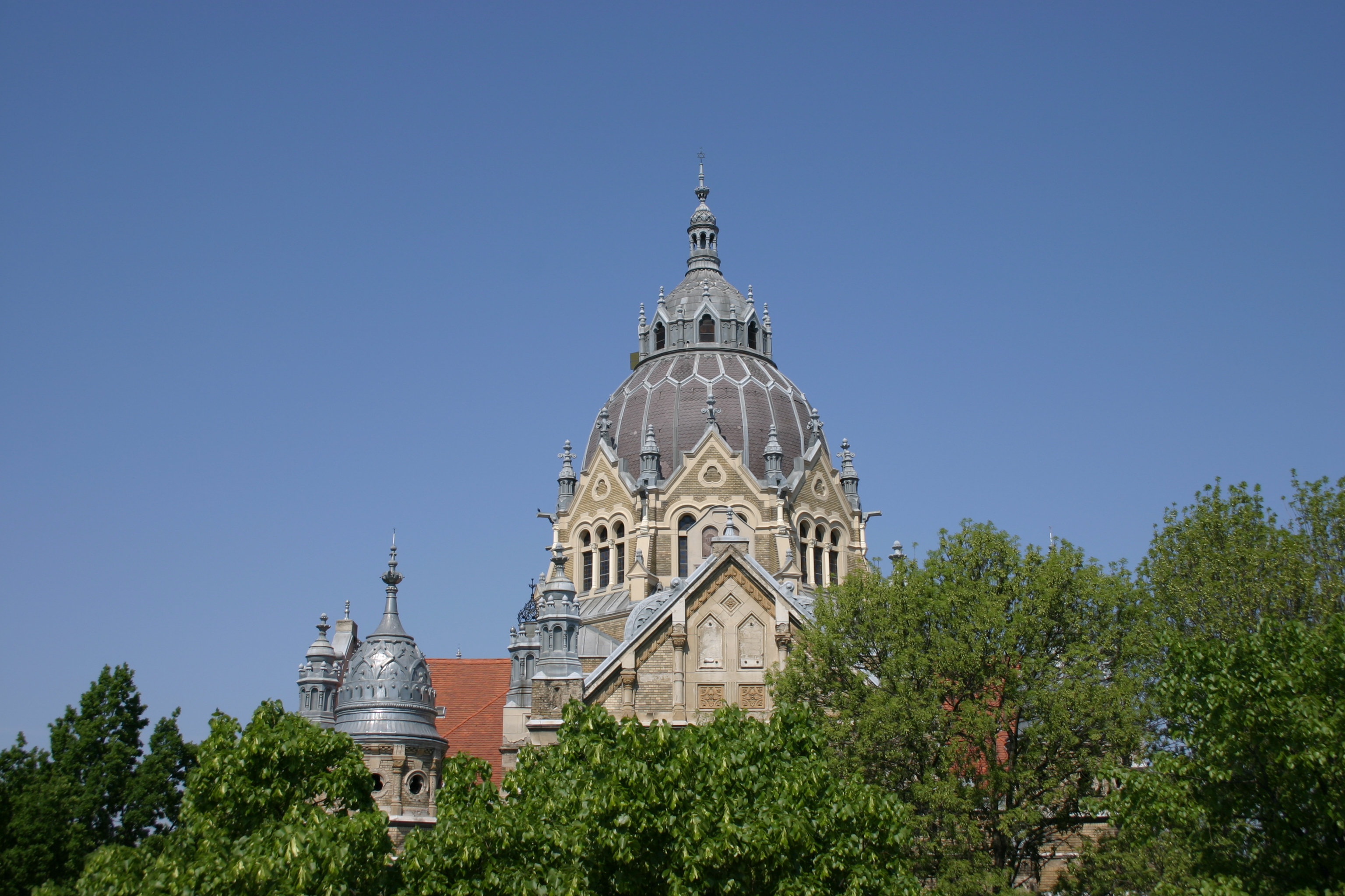 Szeged: az új zsinagóga barokk stílusú kupolája